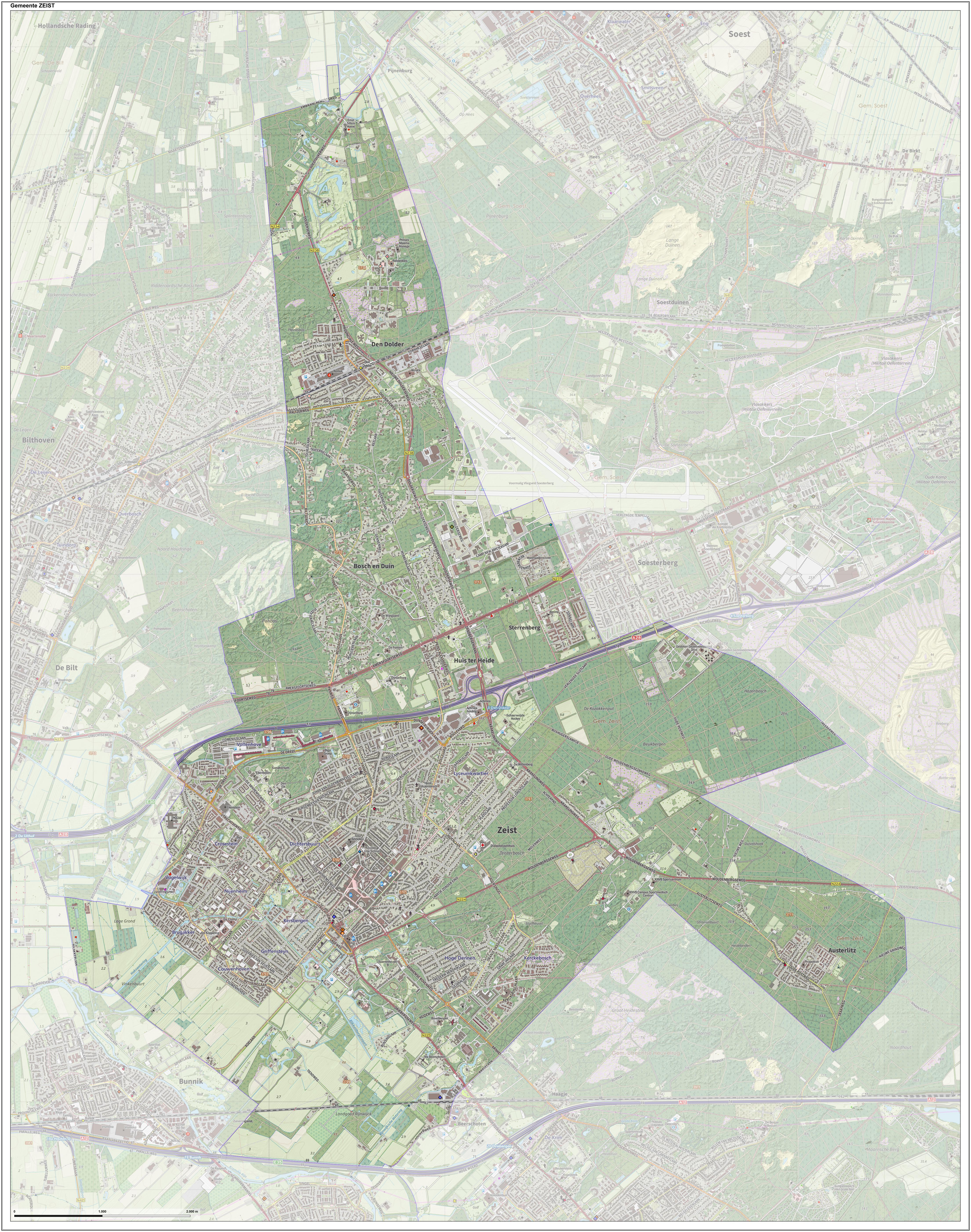 Topografische gemeentekaart. Resolutie: 400 pixels/km. Kaartbeeld samengesteld uit de open geodata van de Top10NL en Top25namen (Kadaster), Creative Commons-BY licentie. Gebouwvlakken uit open geodata BAG extract. Wegen uit de OpenStreetMap, OpenStreetMap community. Reliëfschaduw uit de Actuele Hoogtekaart AHN2. Samenstelling en kleurenschema: Jan-Willem van Aalst, met QGIS. Zie ook de Legenda.